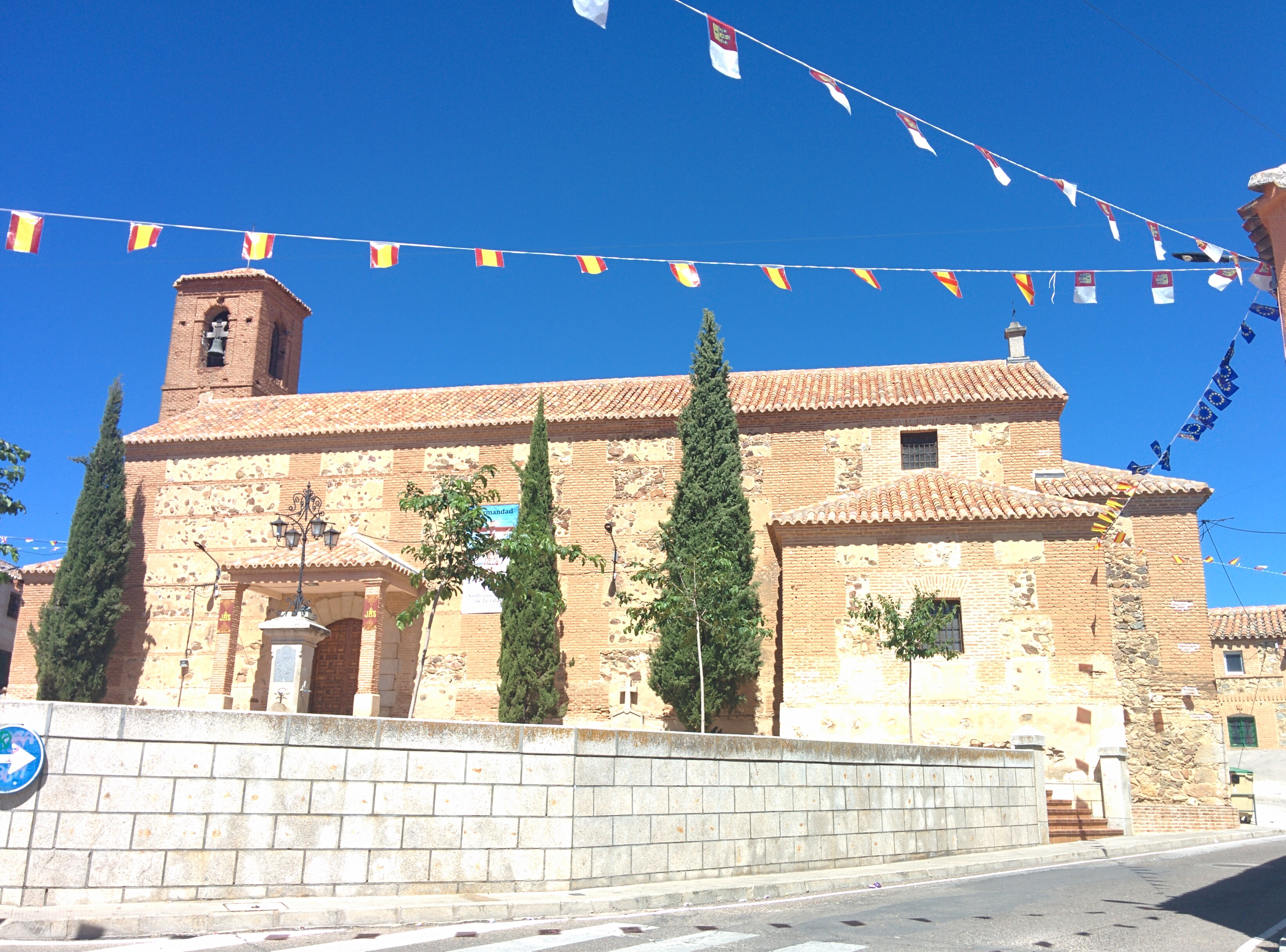 Iglesia de San Julián, en Noez (Toledo, España).